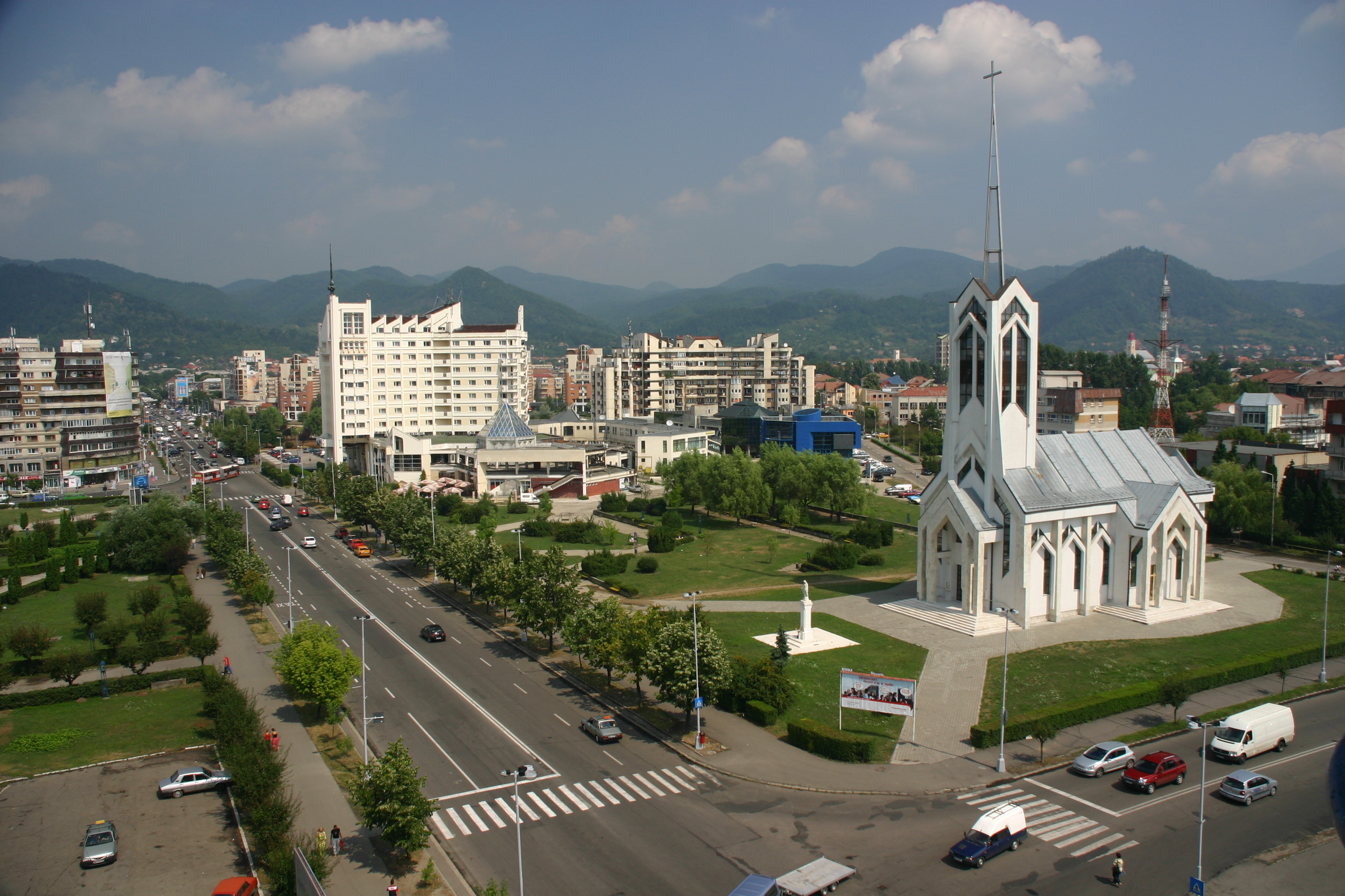 IMAGINE ZMBM5